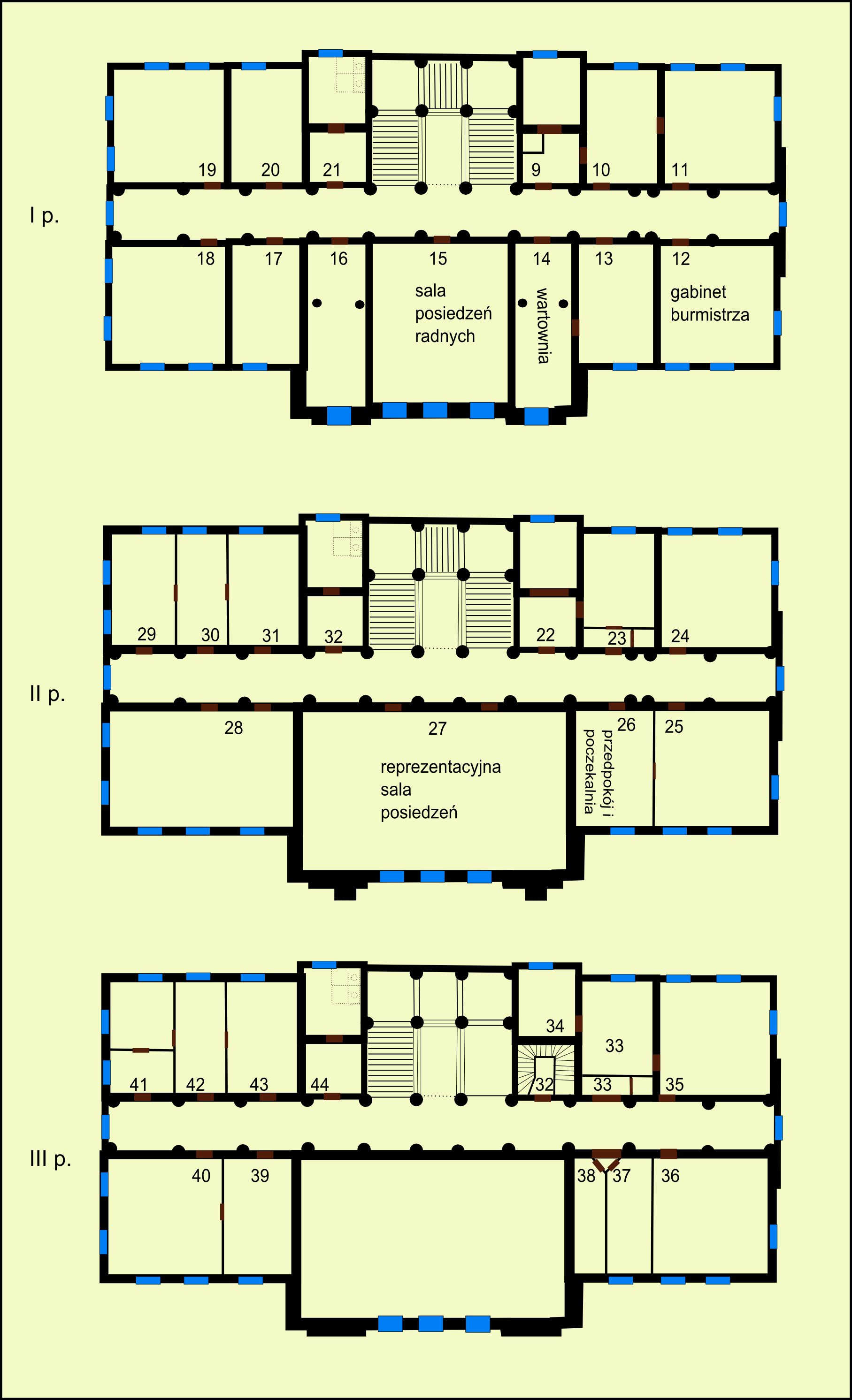 na podstawie planów Nowego Ratusza, nie do celów projektowych